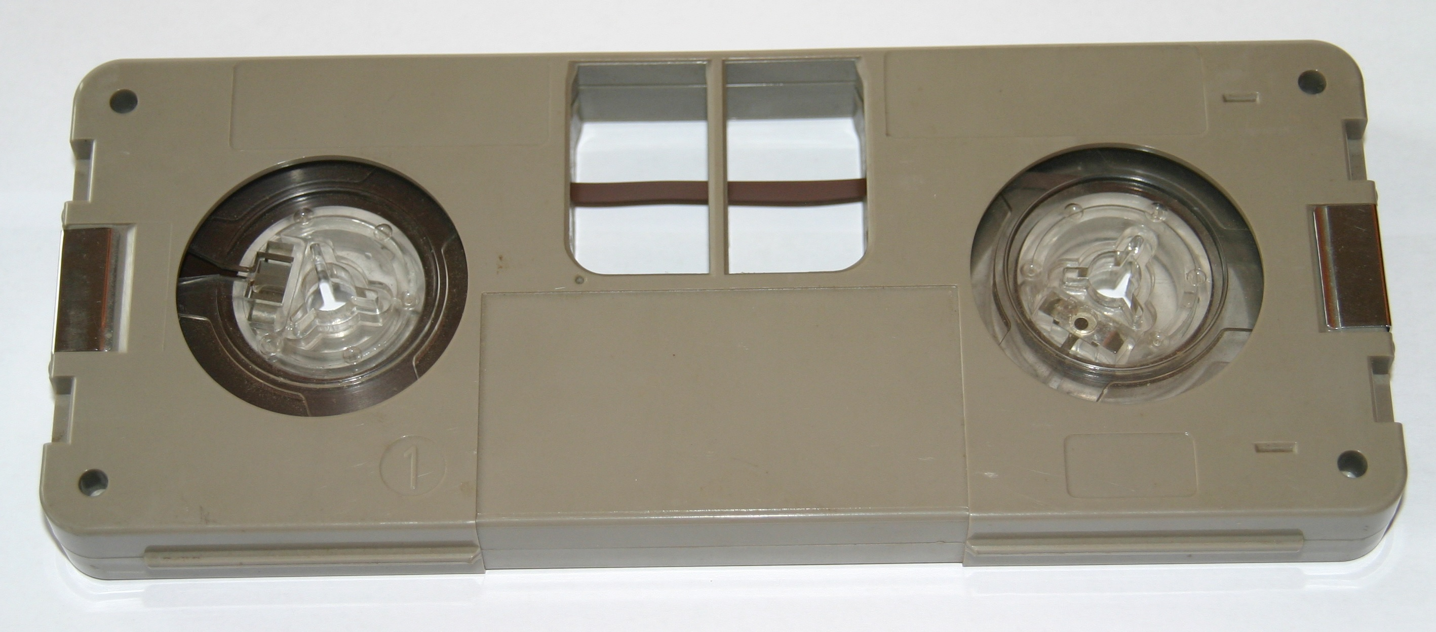 Wendekasette eines Sabamobil, 1. Seite